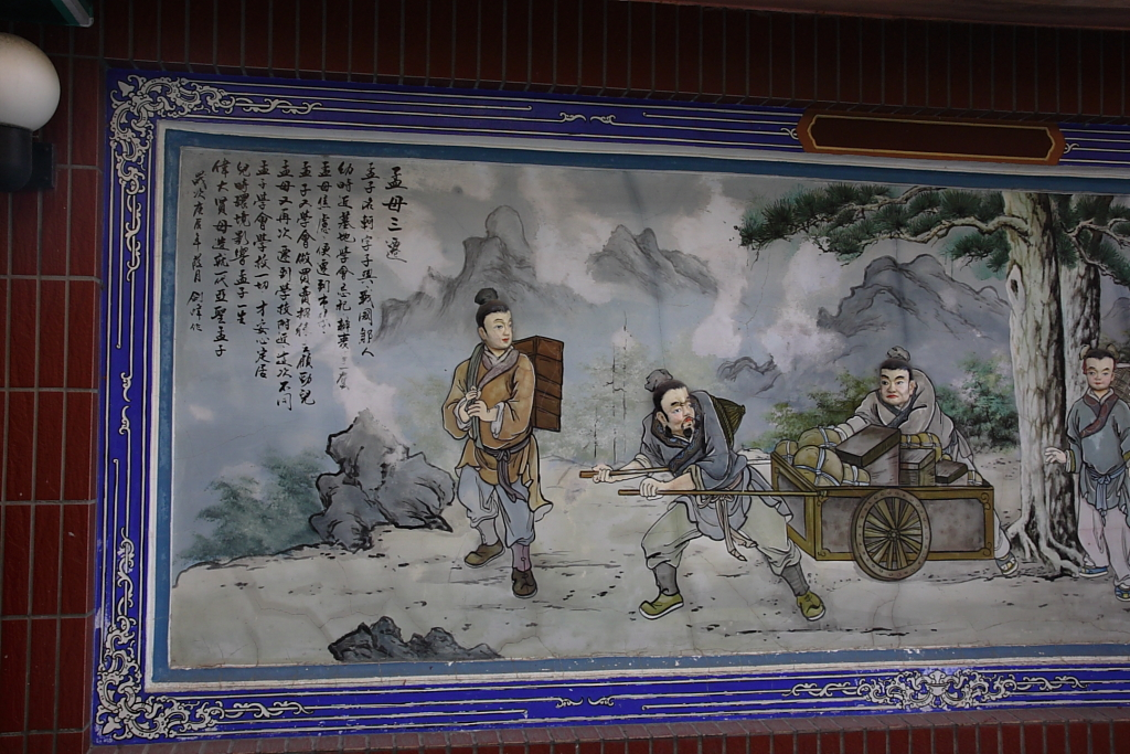 中文（台灣）: 慶誠宮壁畫，孟母三遷